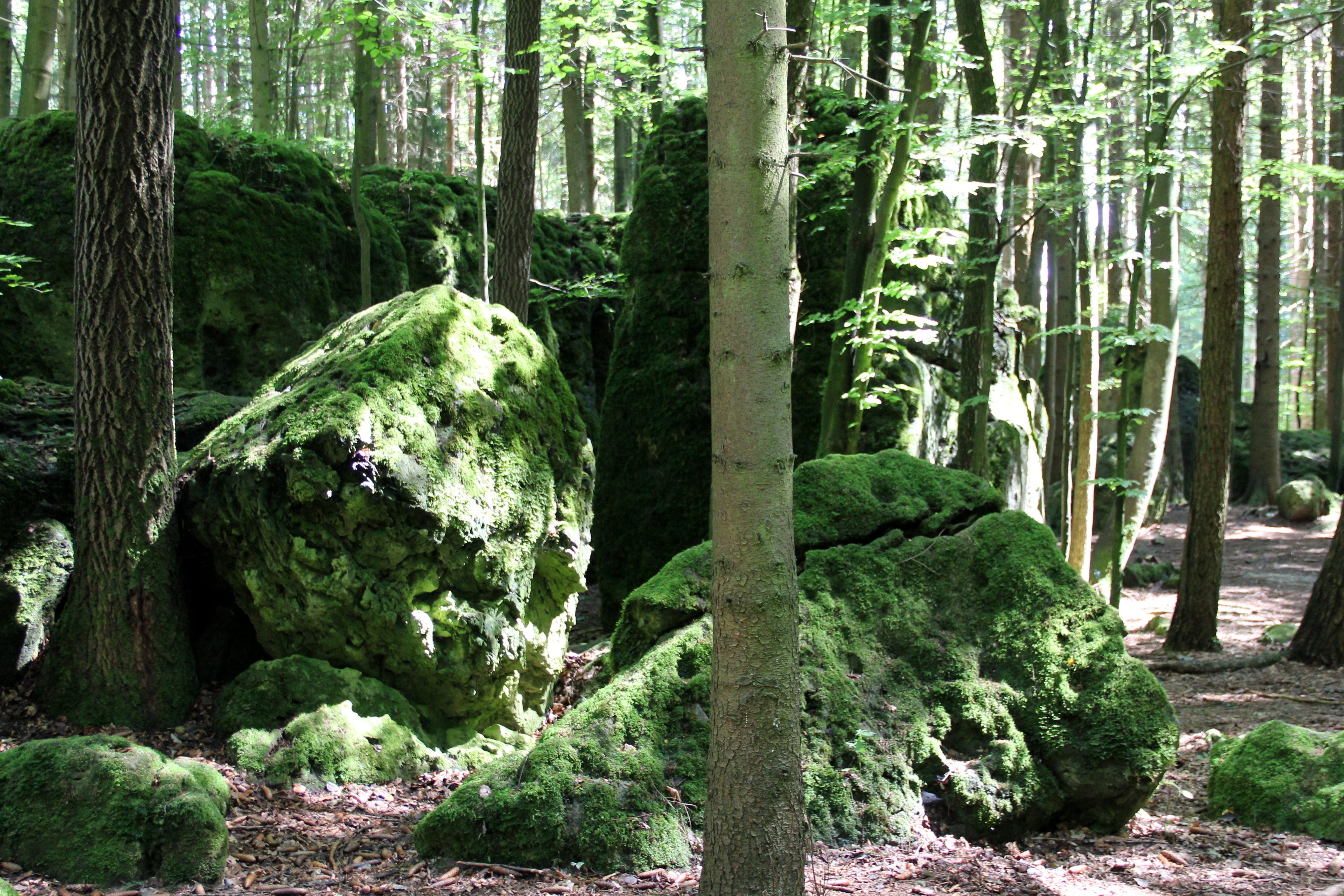 Druidenhain (Wohlmannsgesees)